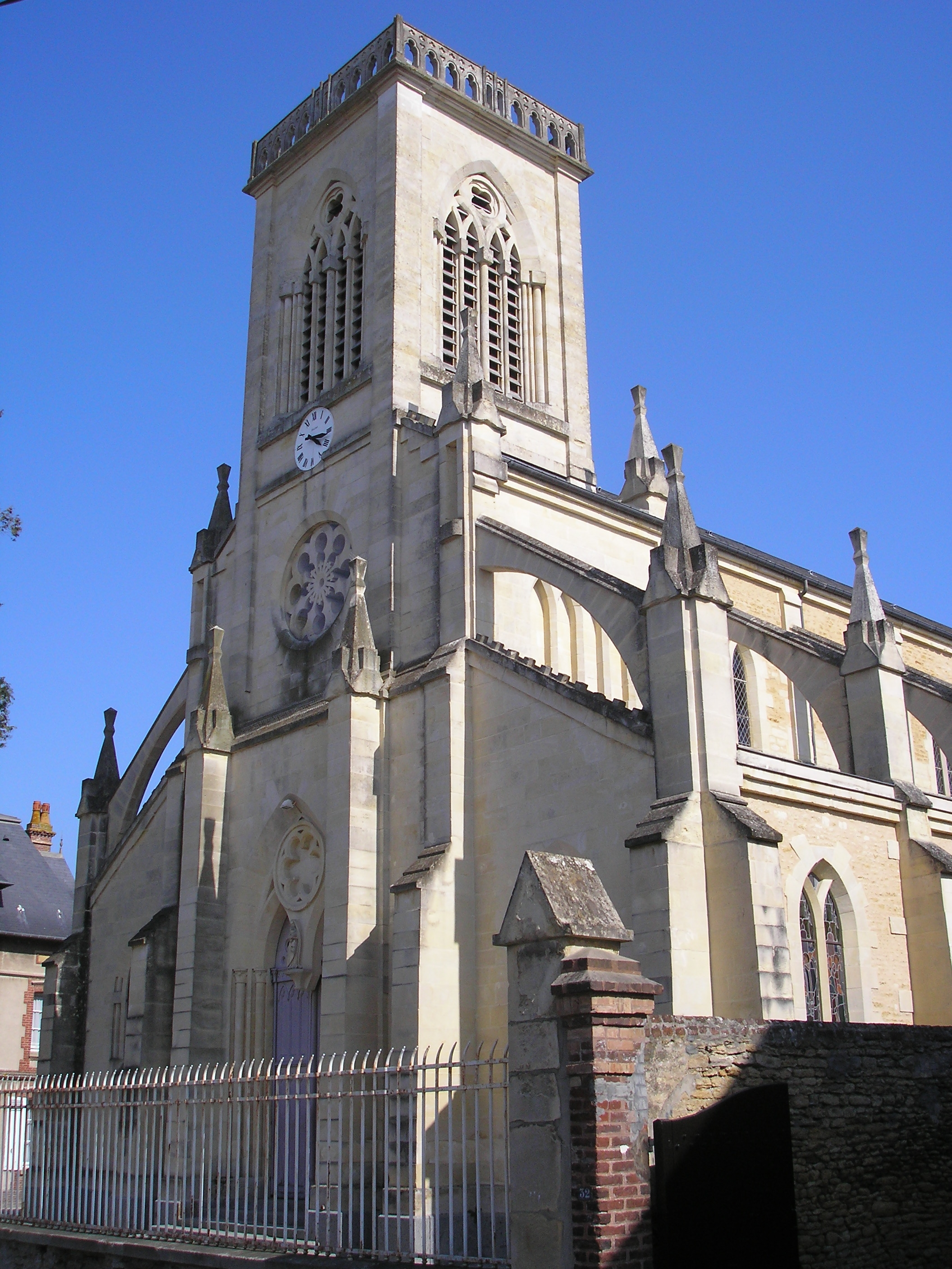 Dozulé (Normandie, France). L'église Notre-Dame.